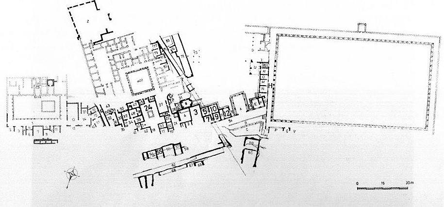 Mappa di villa Arianna e secondo complesso